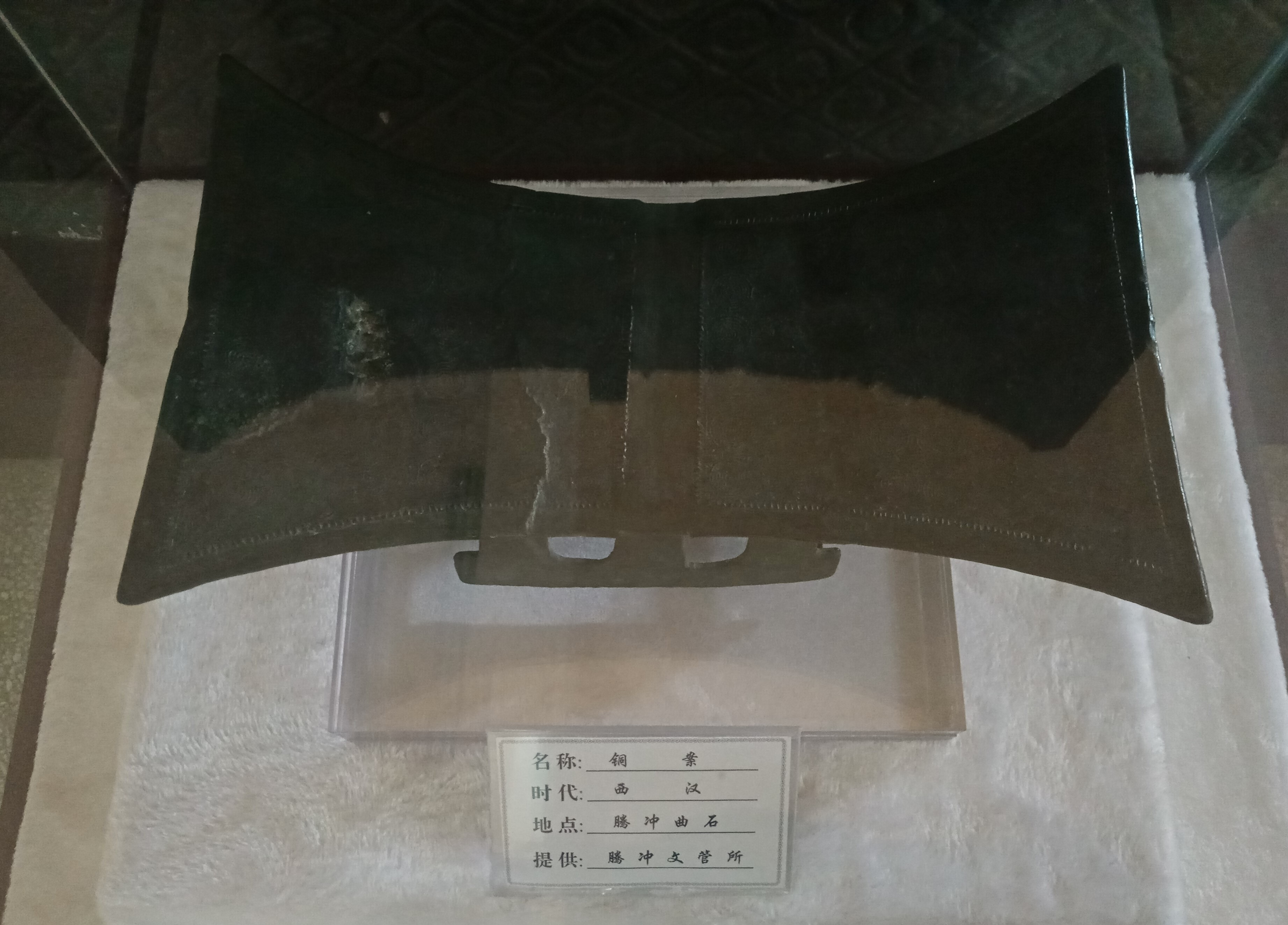 中文（中国大陆）: 保山市博物馆-西汉-腾冲曲石-铜案